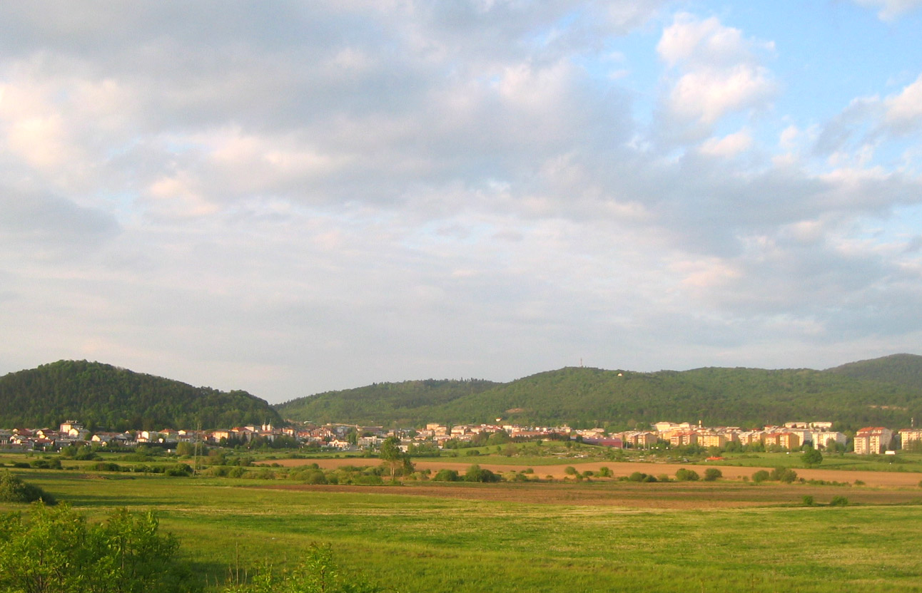 Postojna, town in Slovenia